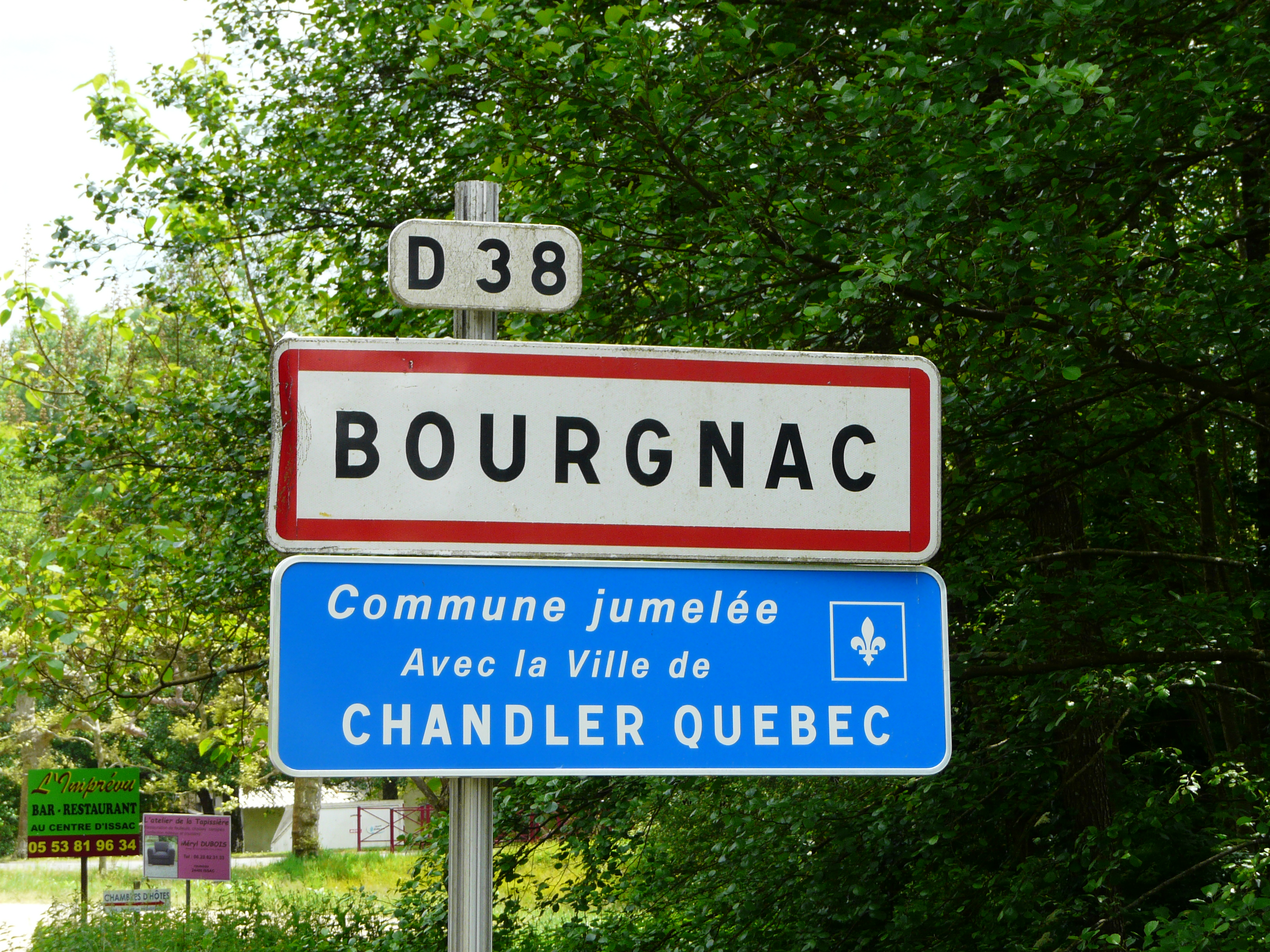 Panneau de jumelage, Bourgnac, Dordogne, France.